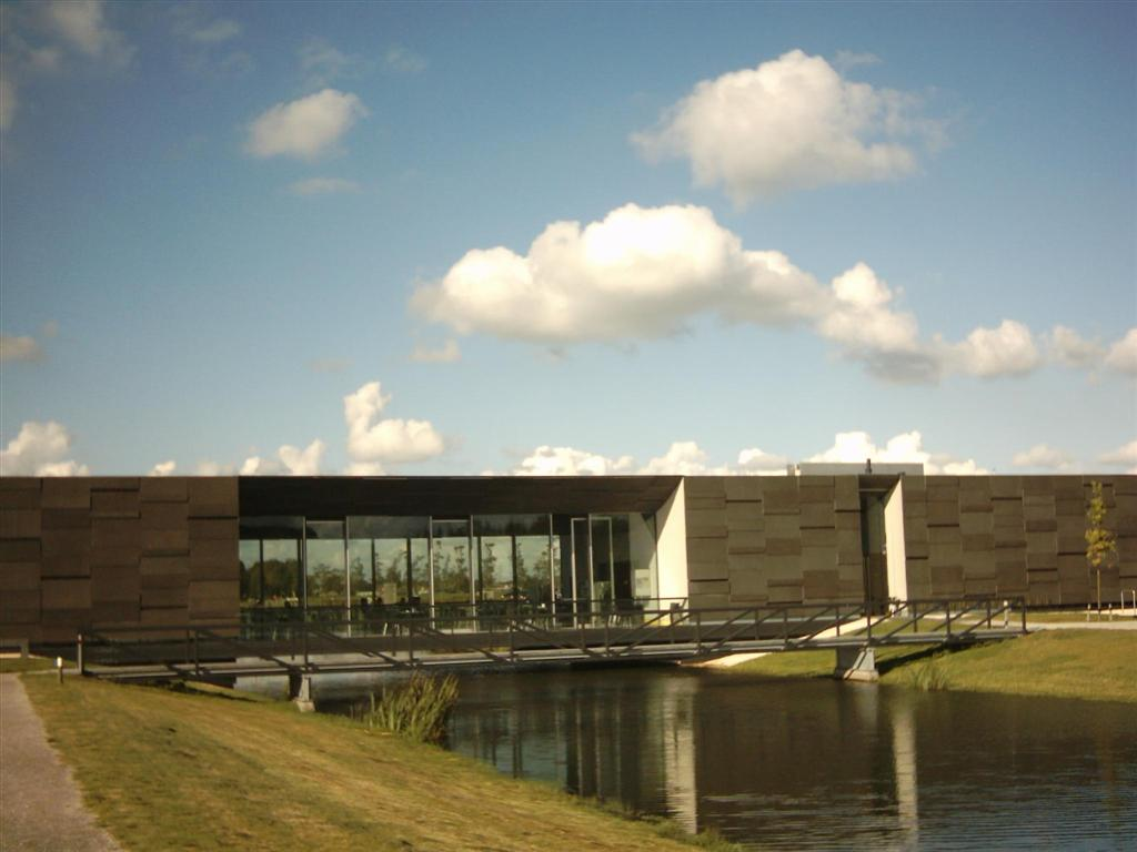 Museum Belvedere bij Heerenveen